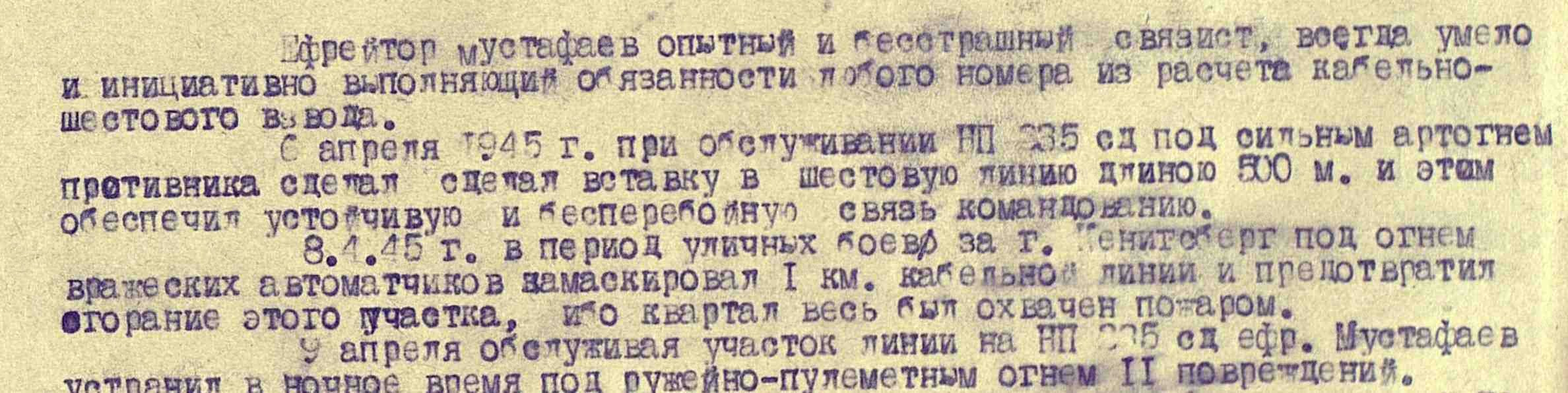 Рассекречено в соответствии с приказом Министра обороны РФ от 8 мая 2007 года N181 «О рассекречивании архивных документов Красной Армии и Военно-Морского Флота за период Великой Отечественной войны 1941-1945 годов» (с изменениями на 30 мая 2009 года)